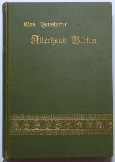 Max Haushofer (1840–1907): Allerhand Blätter. Originalausgabe 1899, Verlag von Adolf Bonz & Comp., Stuttgart